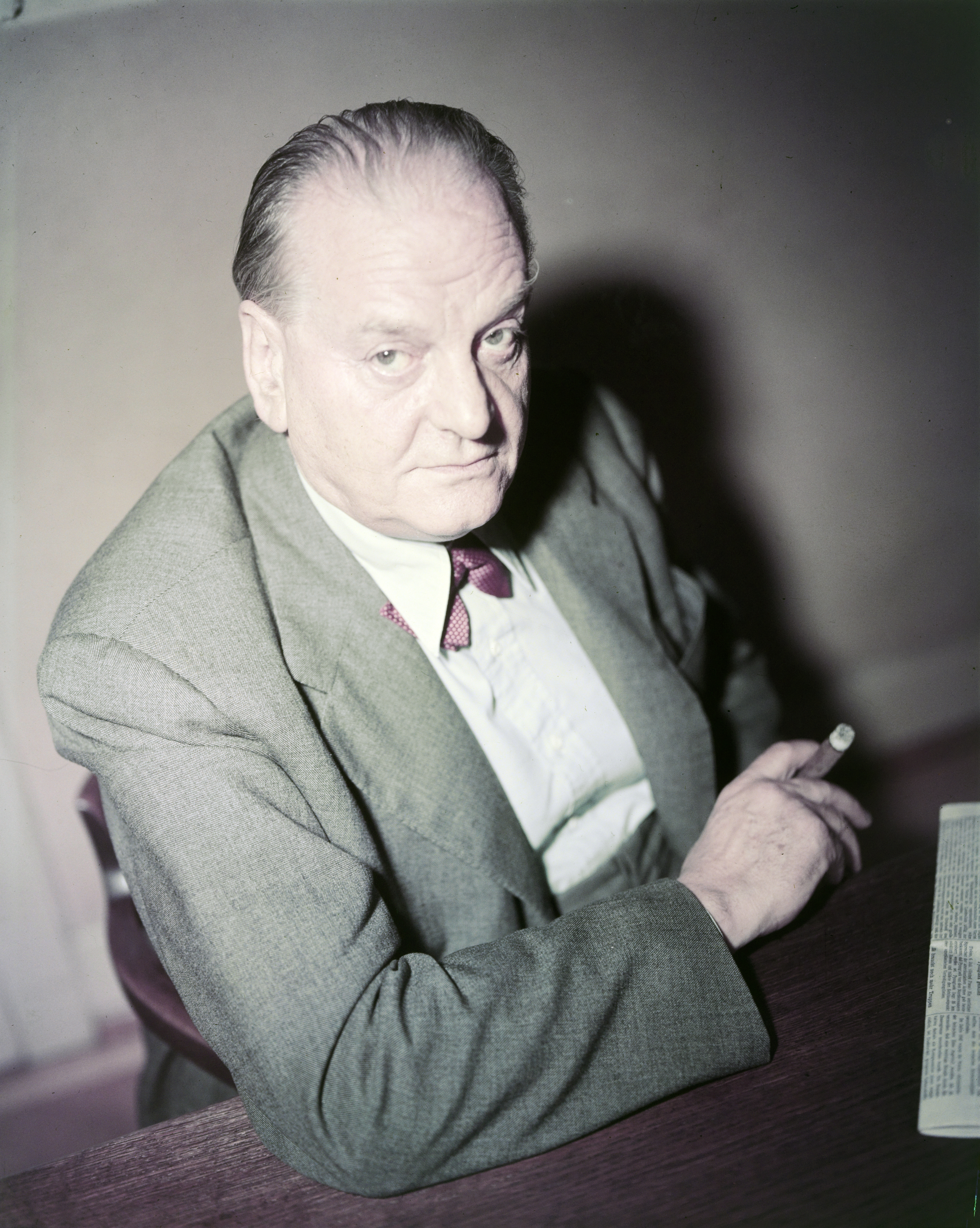 Gottlieb Duttweiler, Migros-Gründer (ca. 1956)